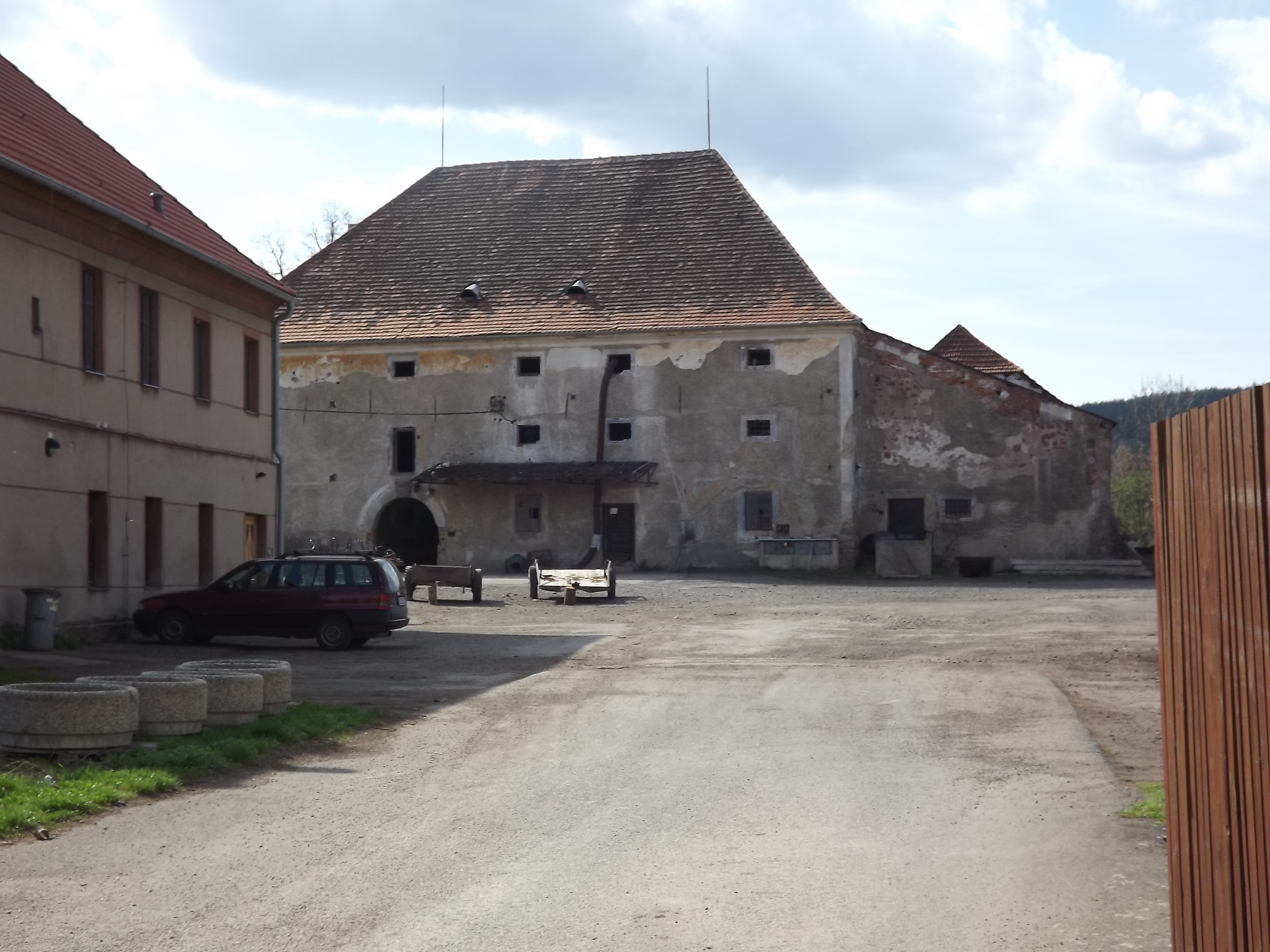 Tvrz, Pičín 1, proti kostelu, Pičín.